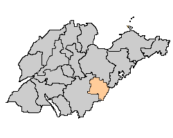 日照在山东省的位置